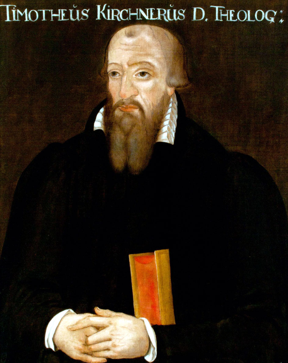 Timotheus Kirchner (1533-1587) deutscher lutherischer Theologe